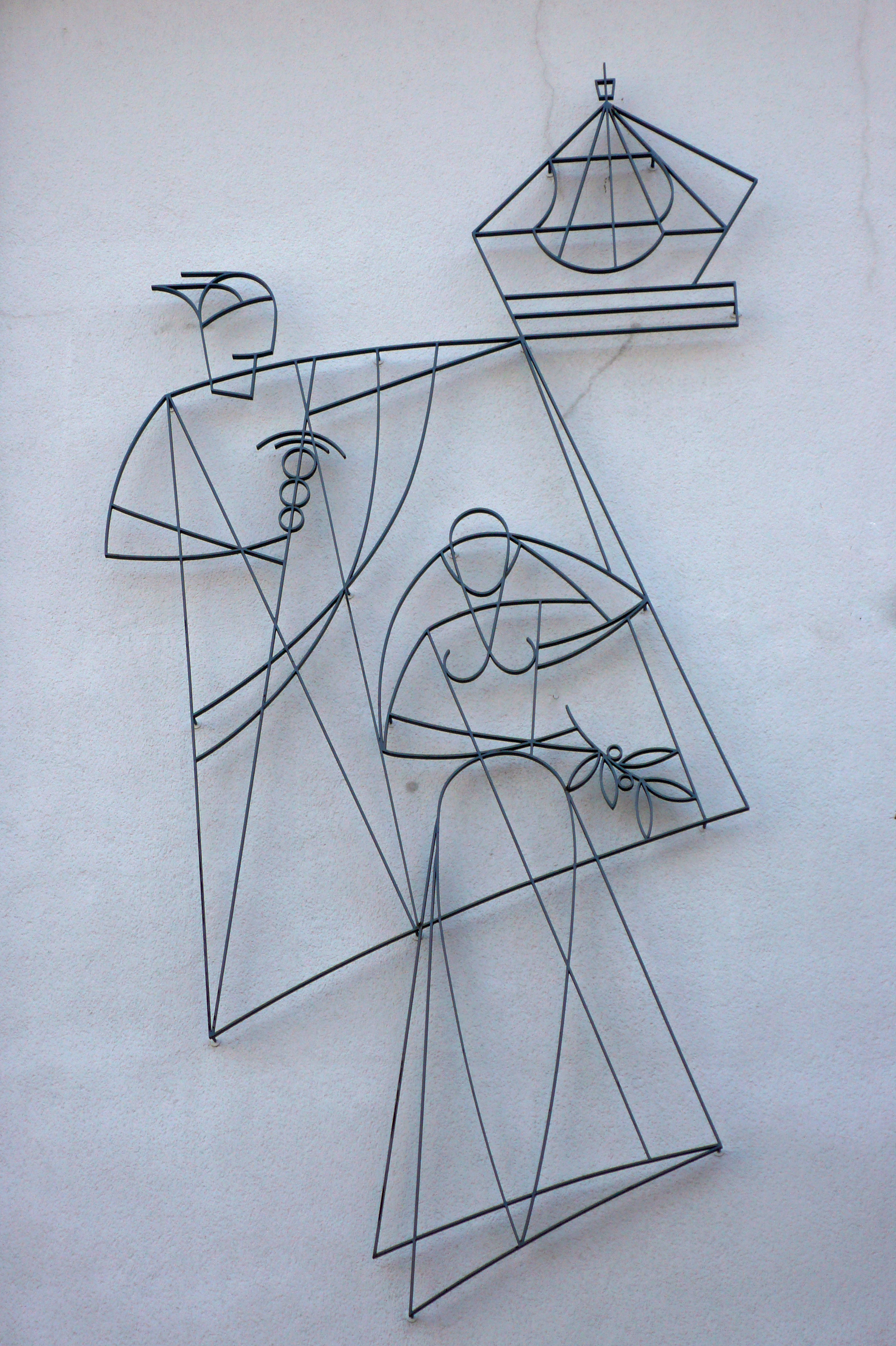 Carl-von-Weinberg-Siedlung in Frankfurt-Westend, 1930-1934, als Projekt des Neuen Frankfurt zunächst Siedlung Miquelallee bezeichnet wurde die Siedlung in der Nachkriegszeit nach Carl von Weinberg benannt